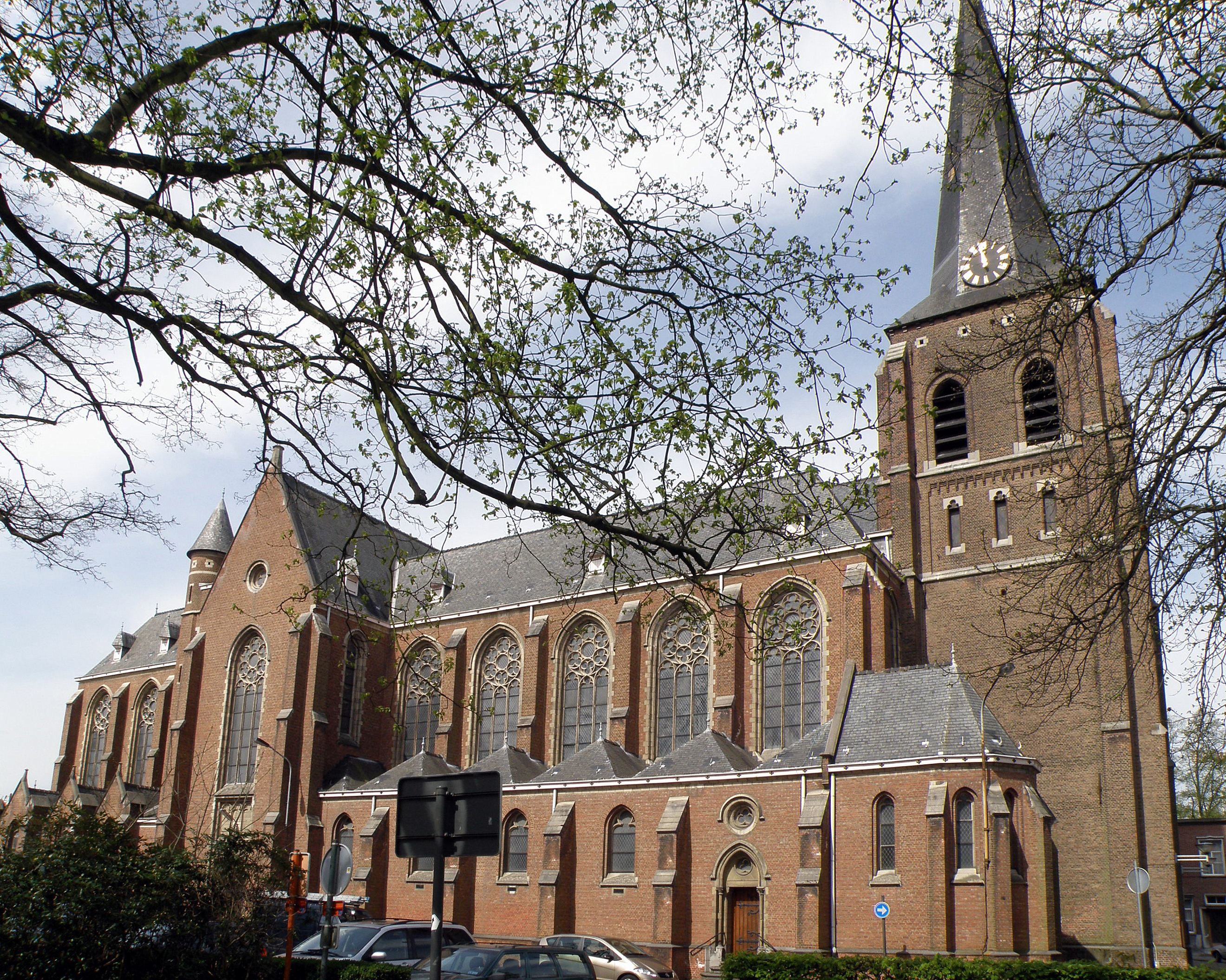 Mortsel bij Antwerpen. Neogot. Heilig Kruiskerk, aan de Heilig-Kruisstraat. Archit. L. Gife.